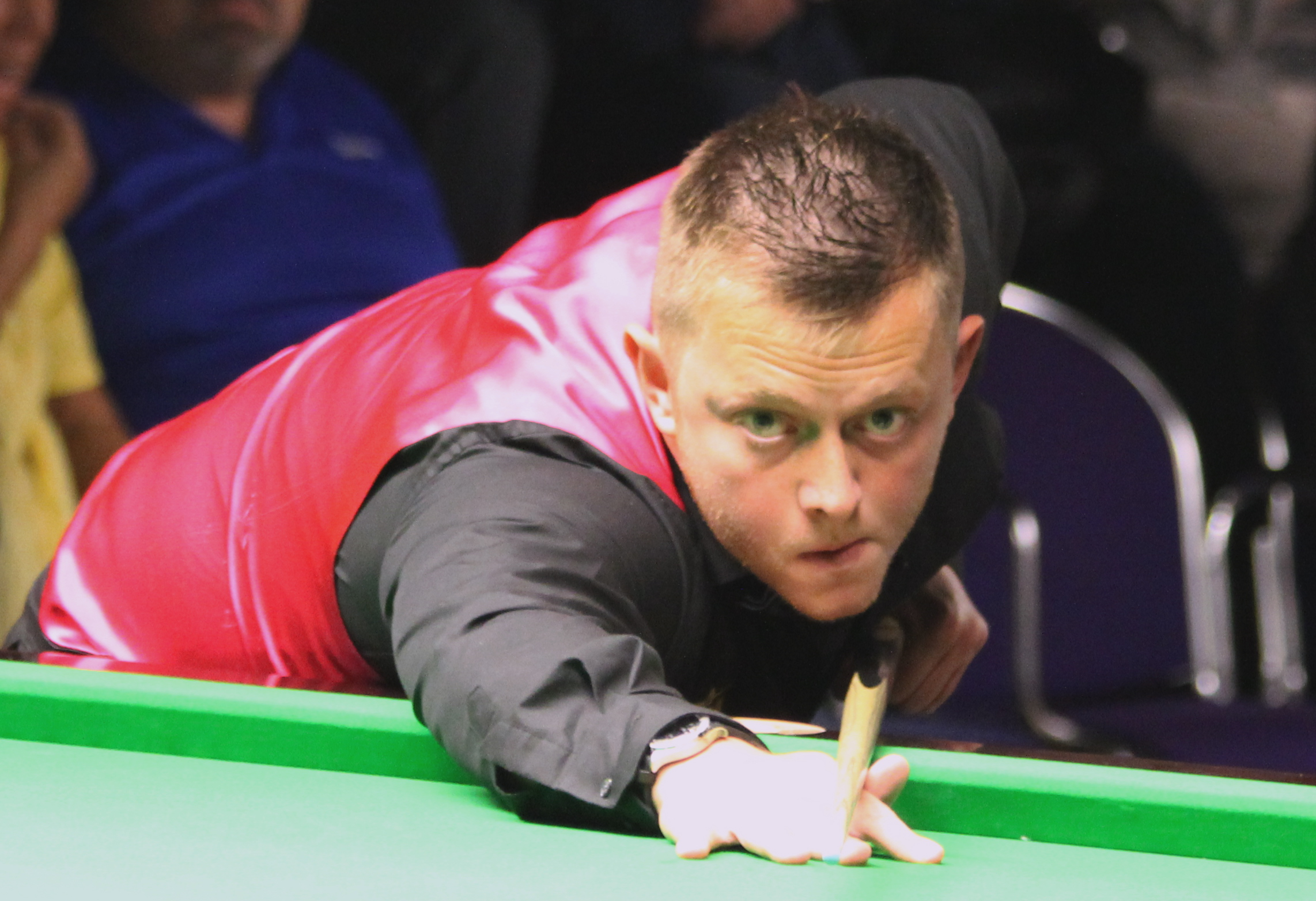 Mark Allen beim Paul Hunter Classic 2012